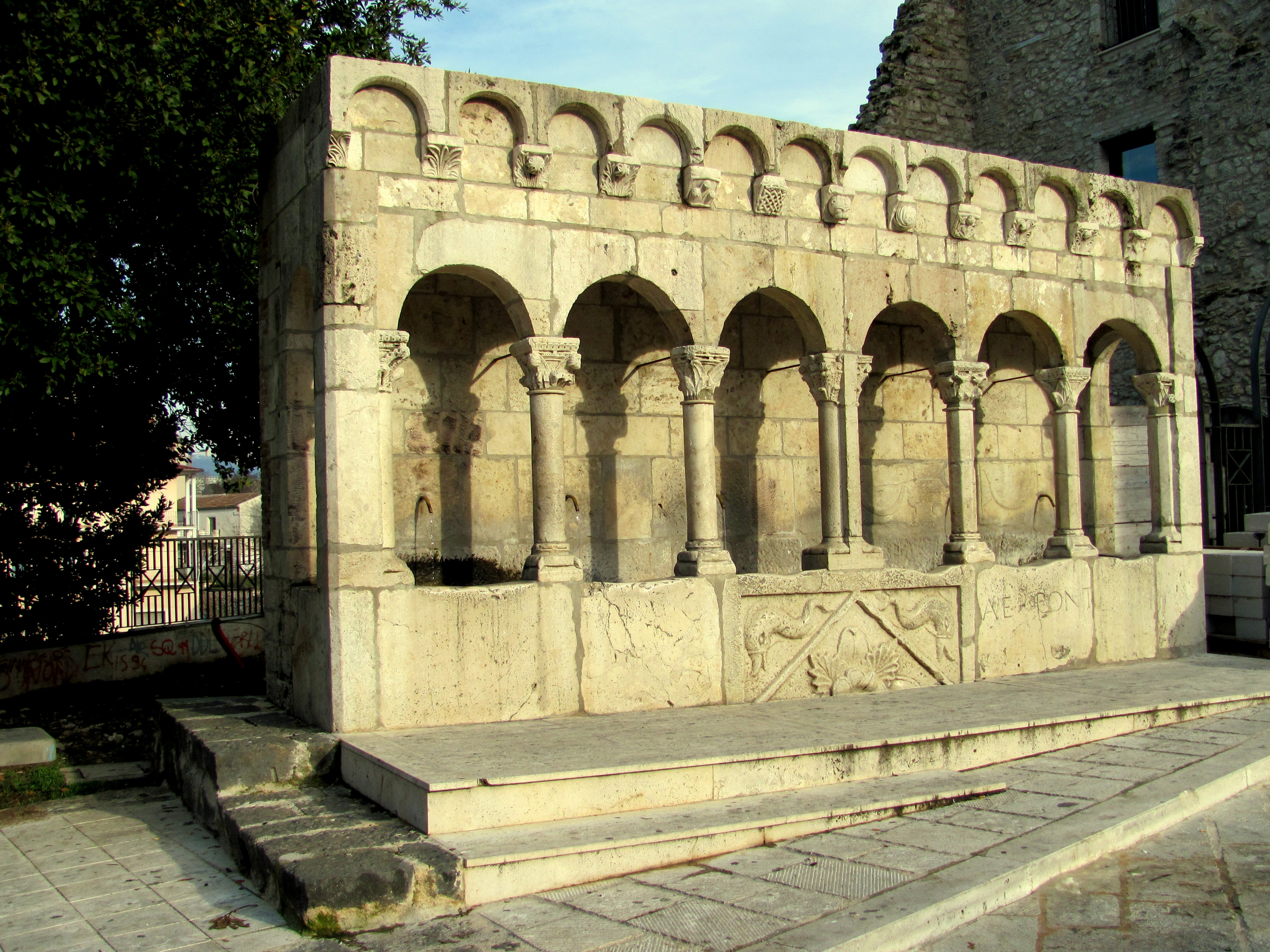 Fontana Fraterna (Isernia) - 1835